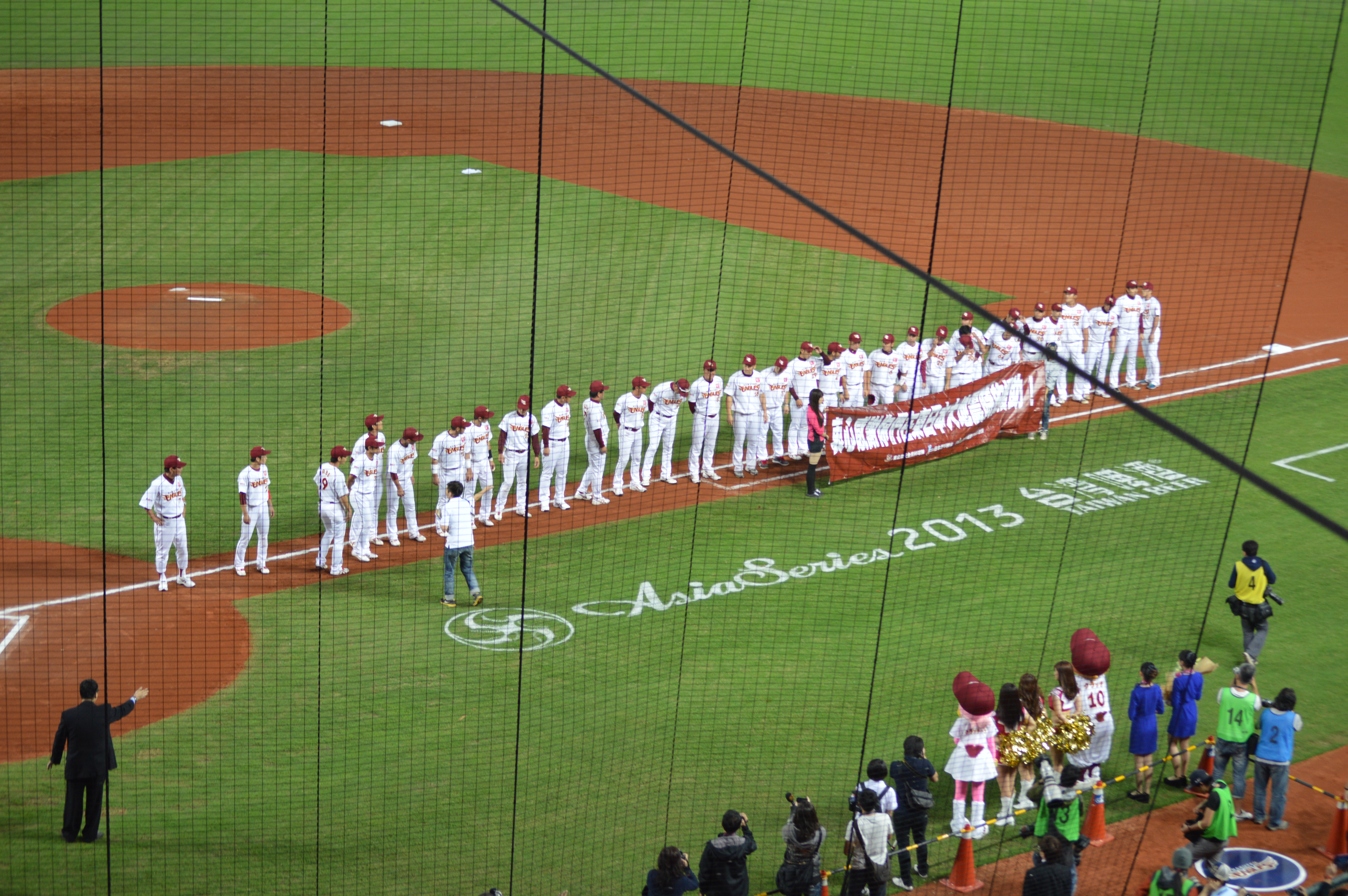 2013亞洲職棒大賽第2場，樂天金鷹出場